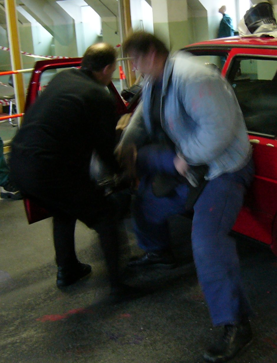 Training zum polizeilichen Einsatzverhalten: Verbringen einer Person aus einem PKW unter Anwendung von Unmittelbarem Zwang